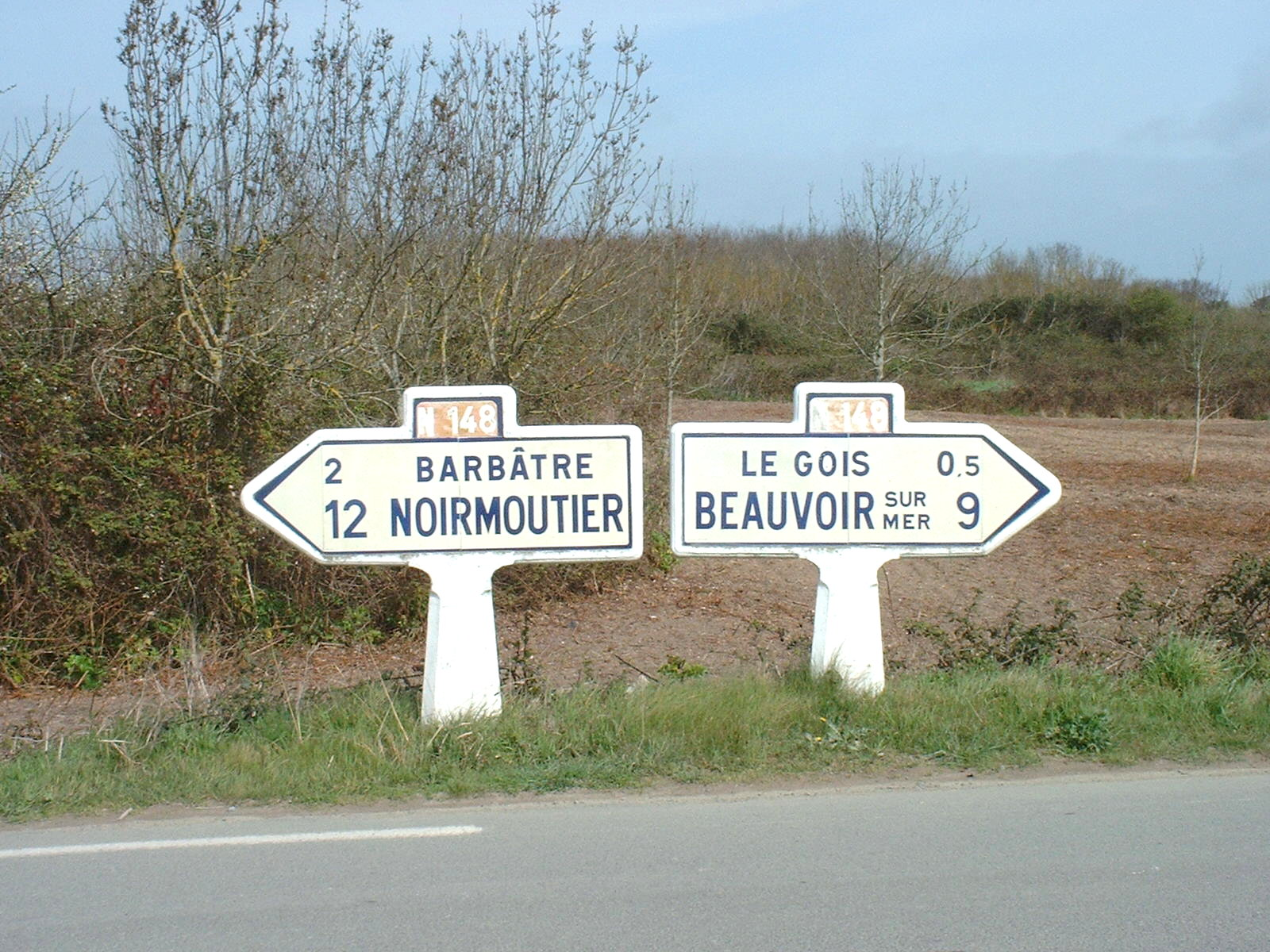 Anciens panneaux de la RN148 à proximité du passage du Gois